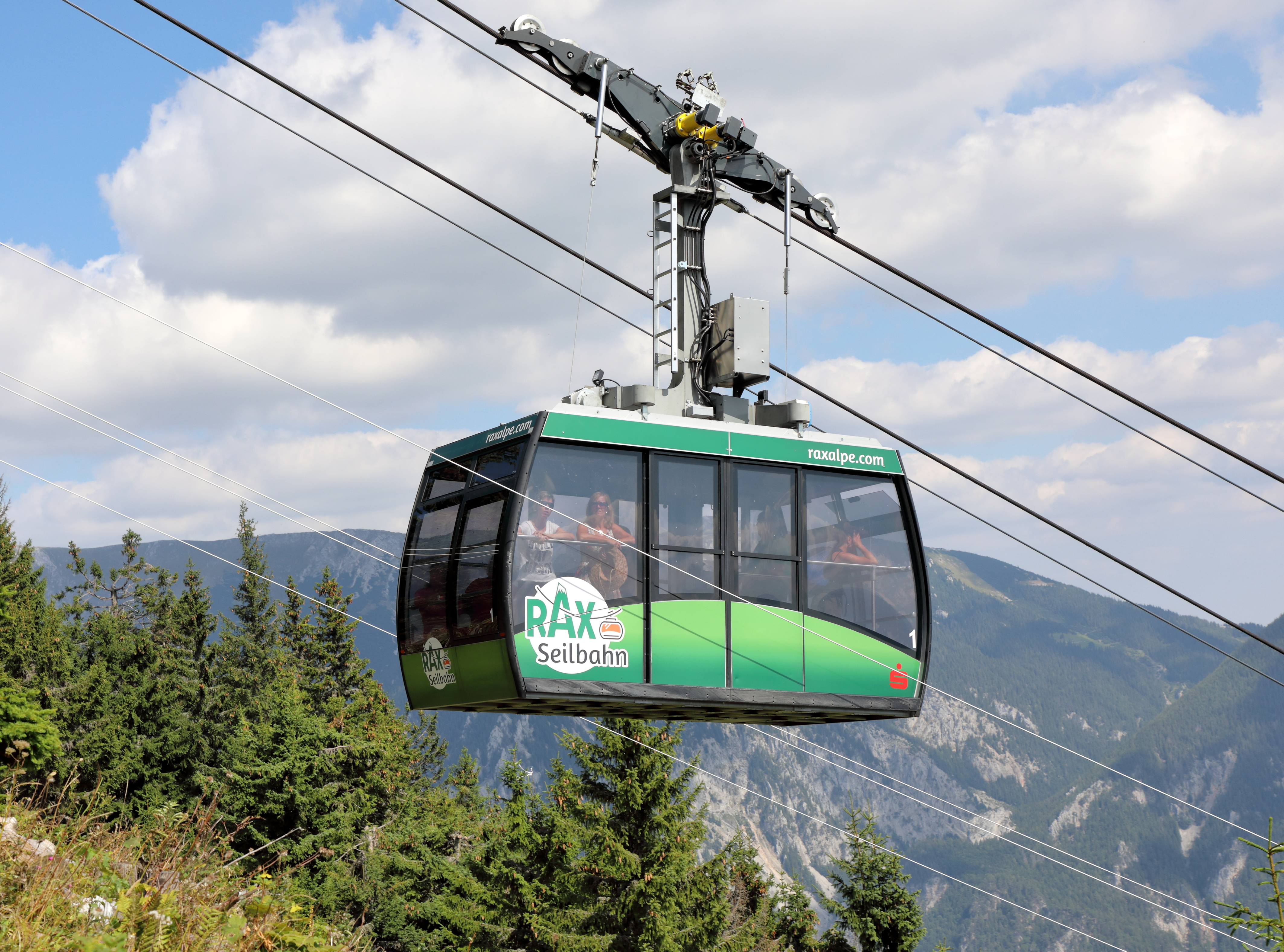 Kabine der in den 1920er Jahren errichteten Rax-Seilbahn vor der Bergstation-Ankunft bzw. zwischen Stütze 4 und 5 in der niederösterreichischen Marktgemeinde Reichenau an der Rax und im Hintergrund das Schneebergmassiv.Die aktuell (2019) eingesetzten Kabinen (4. Generation) der älteste Personen-Seilschwebebahn der Republik Österreich wurden 2002 von der Firma Carvatech gefertigt. Im Zuge eines Umbaues und Generalsanierung der Seilbahn von November 2015 bis Juni 2016 um 3,2 Mio. Euro wurden auch die Kabinen generalsaniert und erhielten ein neues „Outfit“.